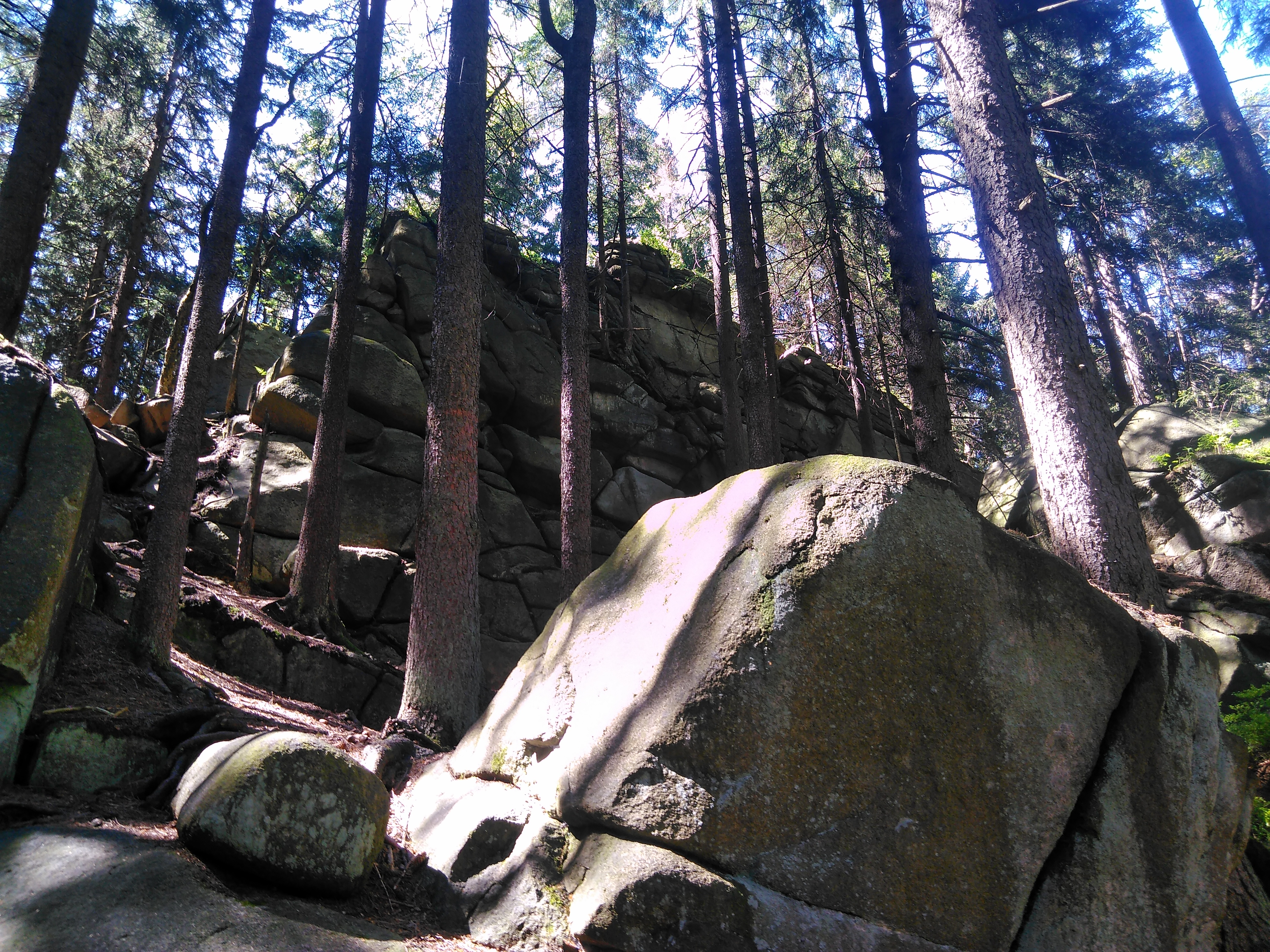 Mausklippe bei Schierke, Himmelfahrt 2017